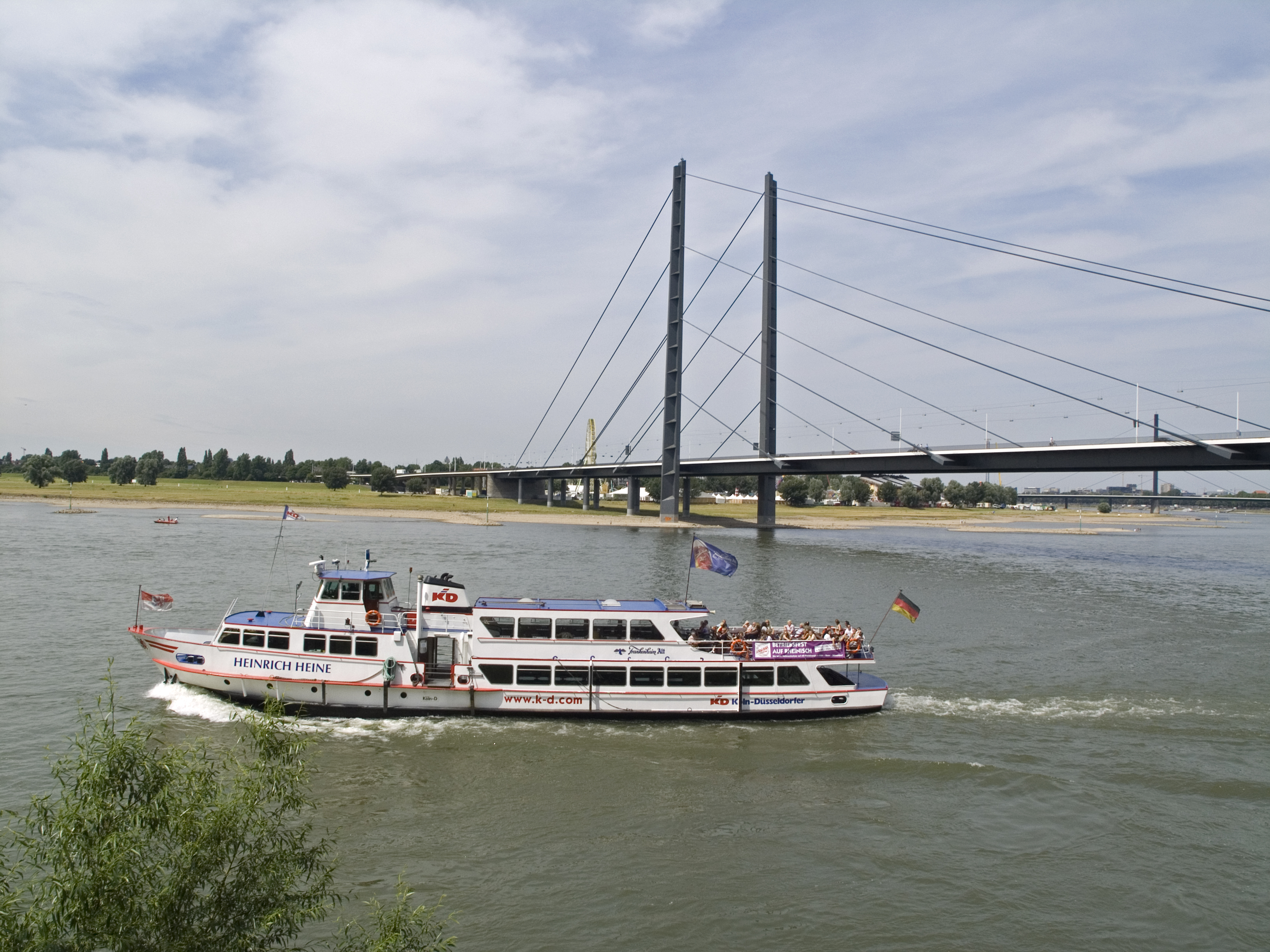 Северный Рейн-Вестфалия, Дюссельдорф - мост Rheinkniebrücke